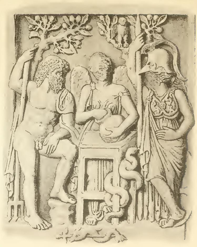 Relief aus Smyrna. Zeigt das Schiedsgericht über Athena und Poseidon um den Besitz der Stadt Athen.